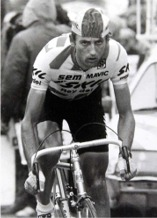 collection personnelle